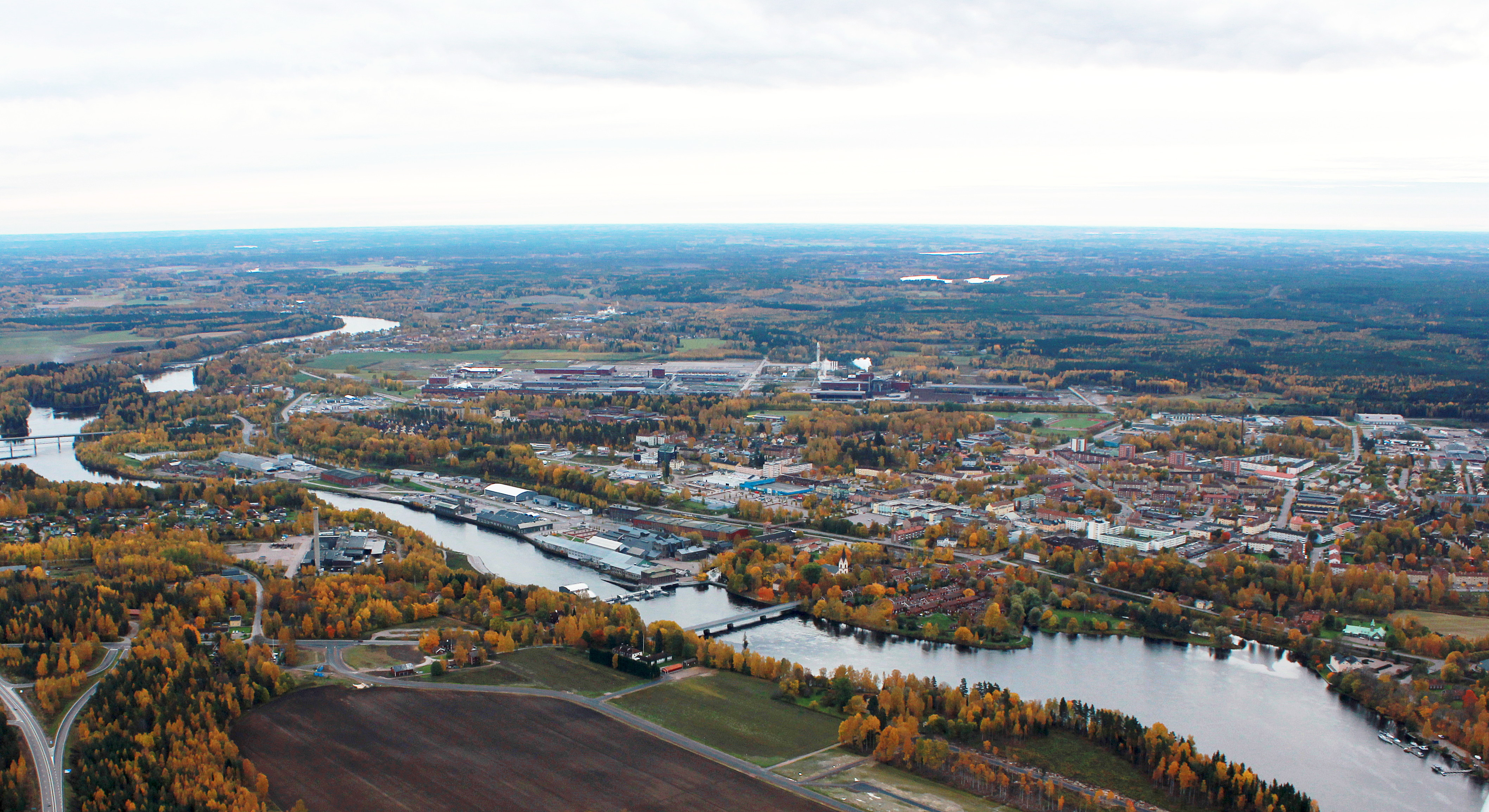 Avesta, från Högbo och Månsbo t.v. till Prästjorden t.h, med Dalälven tvärs igenom. Riksväg 70 i nedre vänstra hörnet.